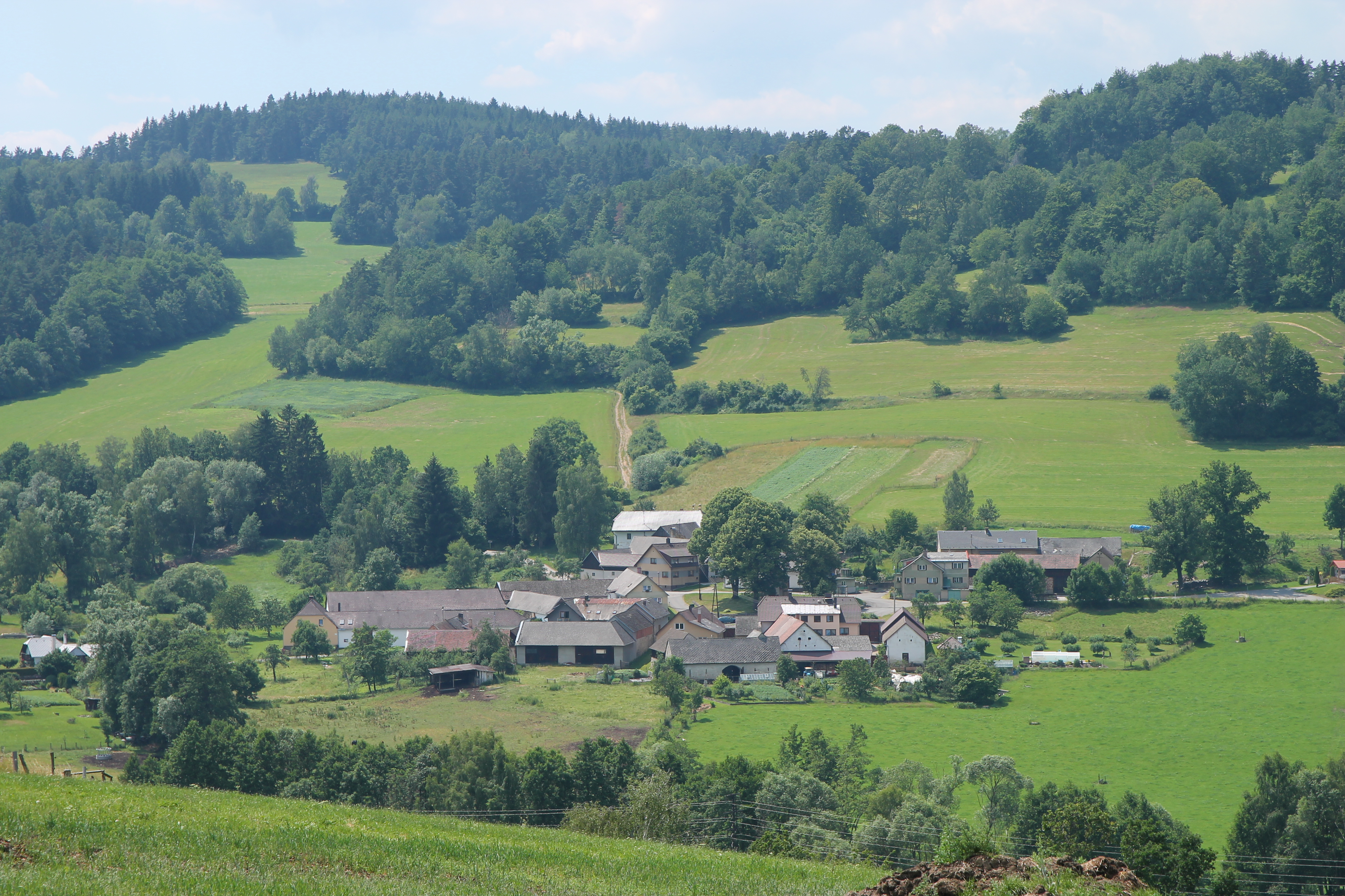 Pohled na Bořanovice u Vimperka od Smrčné